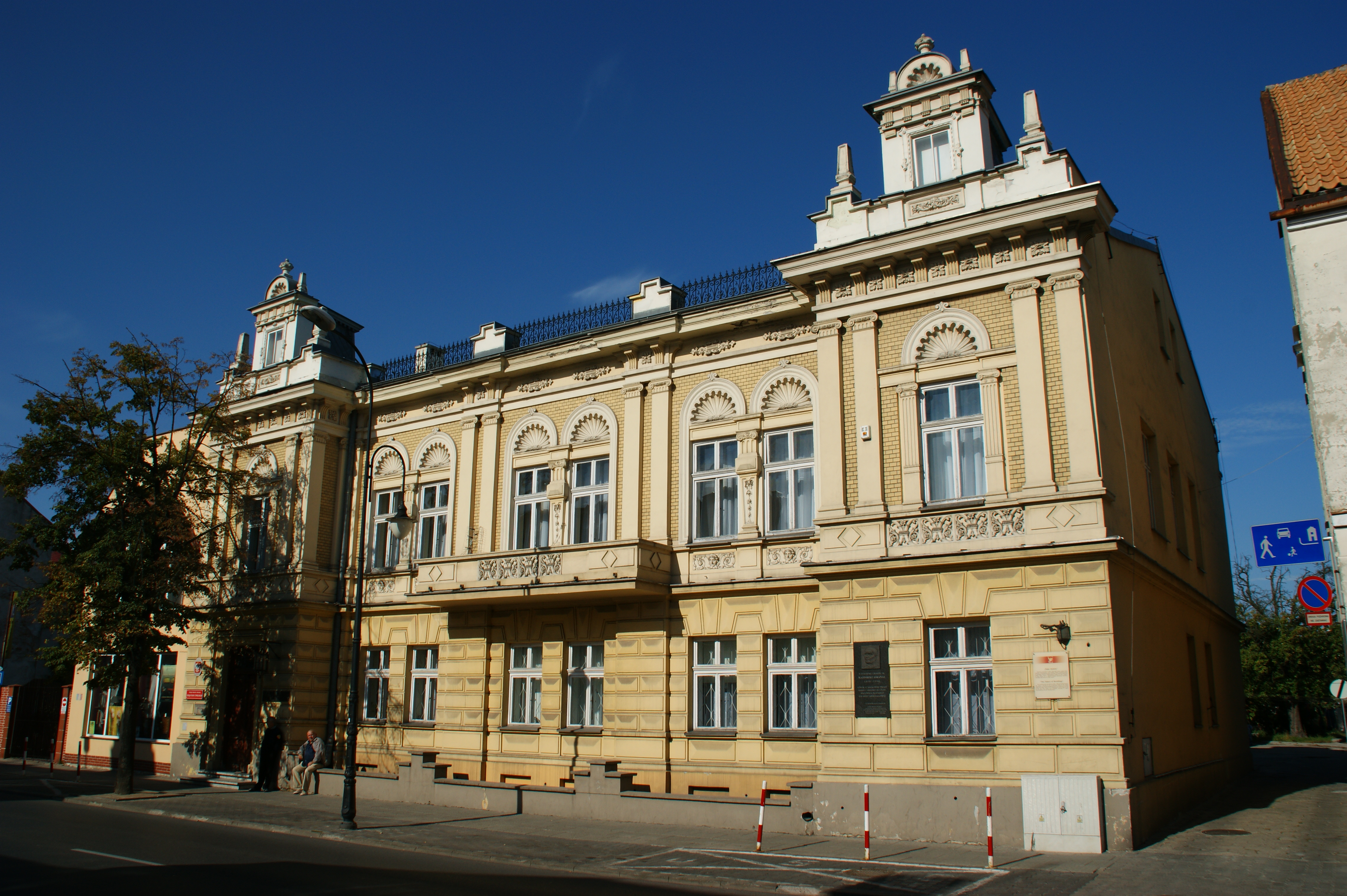 Pałacyk, ob. pałac ślubów, mur., 2 poł. XIX Płock, ul. Kolegialna 9 (zabytek nr rejestr. 1274)